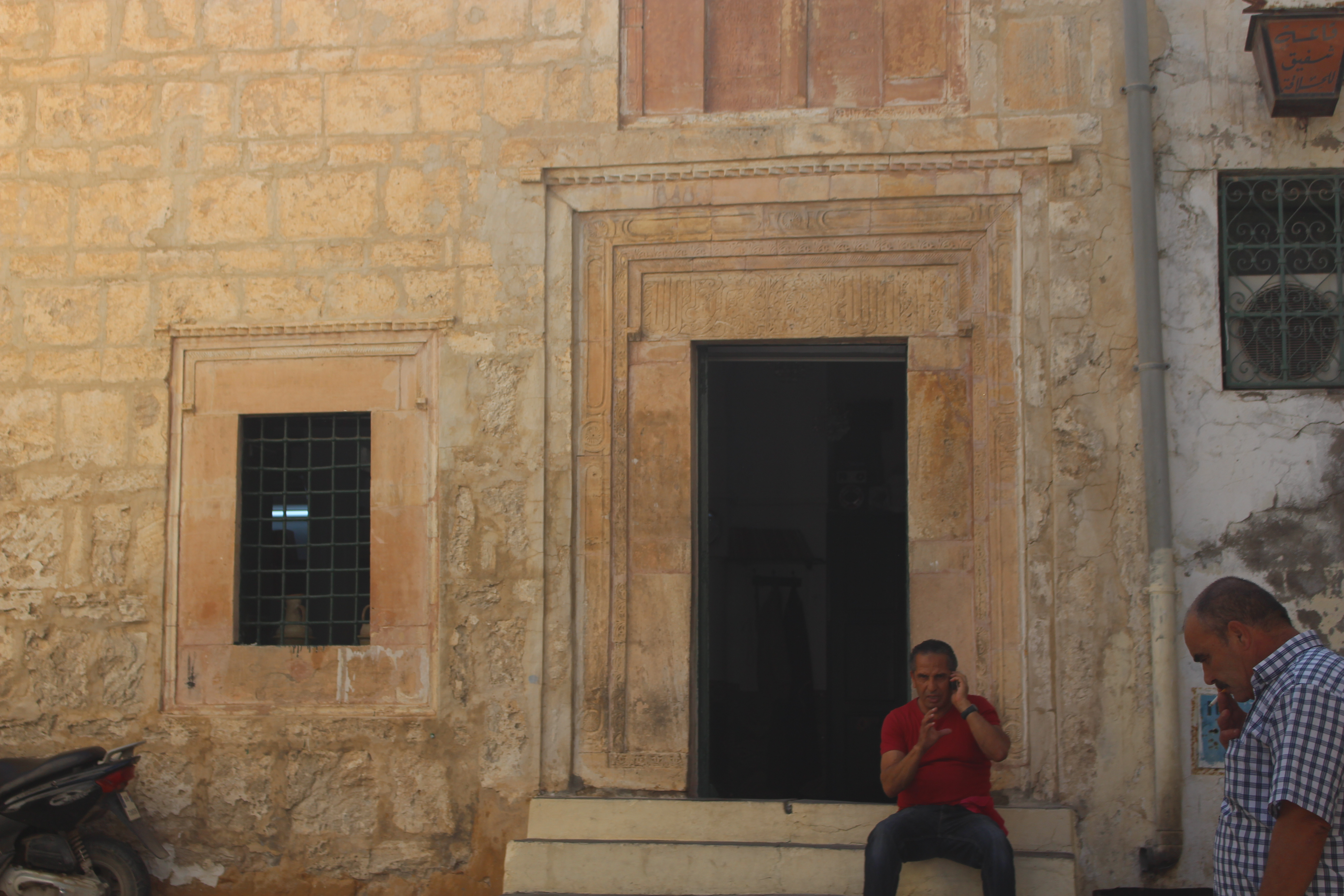 C'est la Mosquée Sidi El Bahri de Sfax, une des plus vieilles mosquées de Sfax. Elle se retrouve près de Beb El Diwan à l'intérieur de la Médina de Sfax.